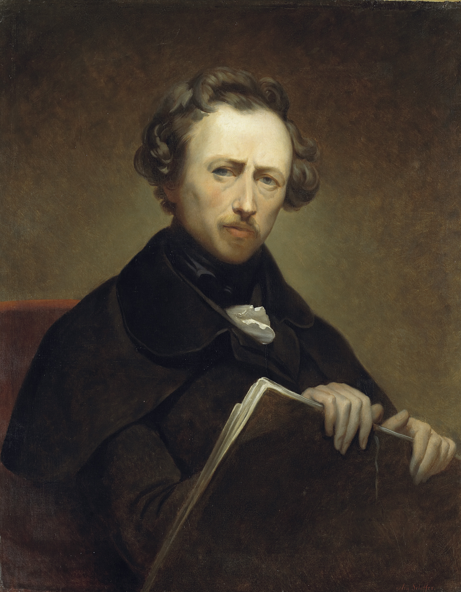 Zelfportret van de schilder Ary Scheffer op 43-jarige leeftijd. Zittend, ten halven lijve, met een portefeuille in de handen.